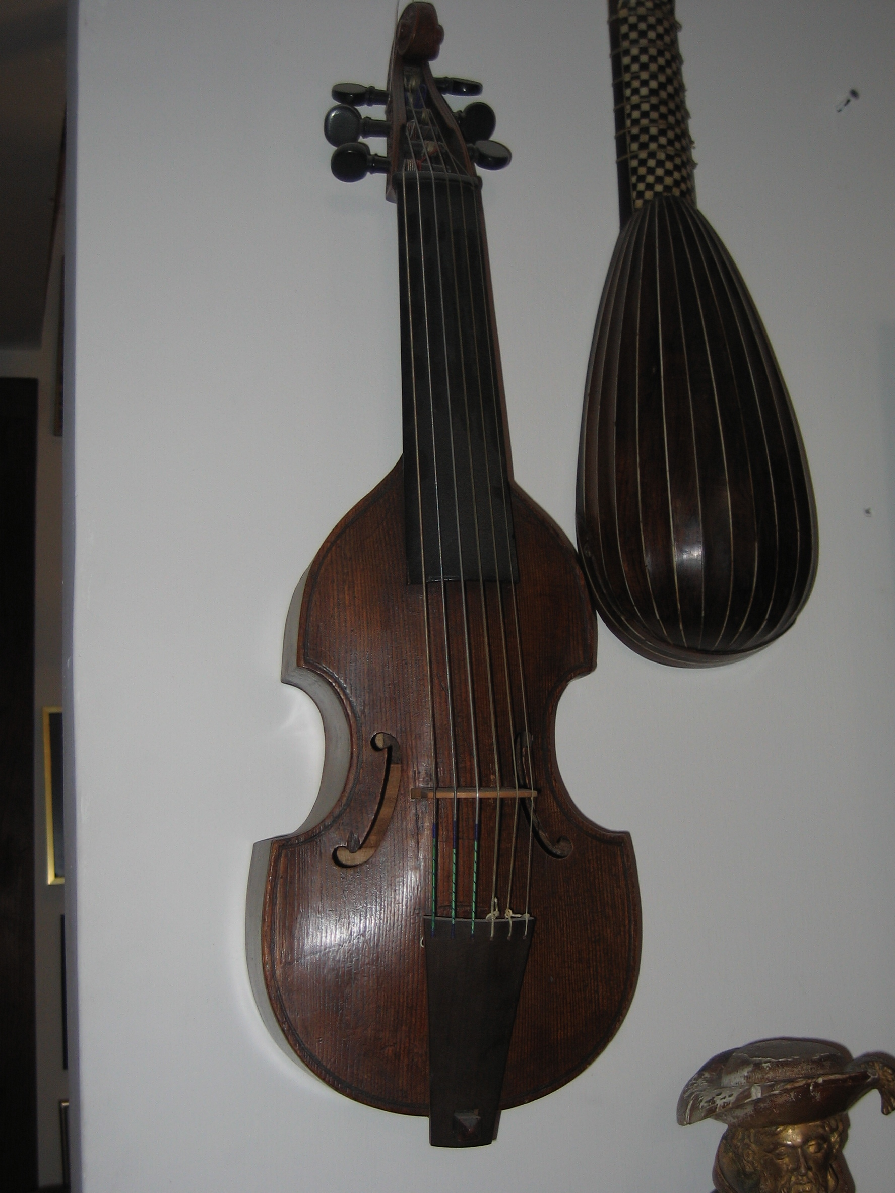 Viola da gamba. Foto di strumenti musicali presso lo studio del maestro liutaio Claude Lebet, Roma